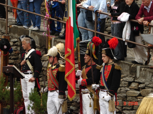 Immagini Milizia Tradizionale di Calasca Colonnello con Capitano e Tenente Alfiere foto personale Agosto 2006